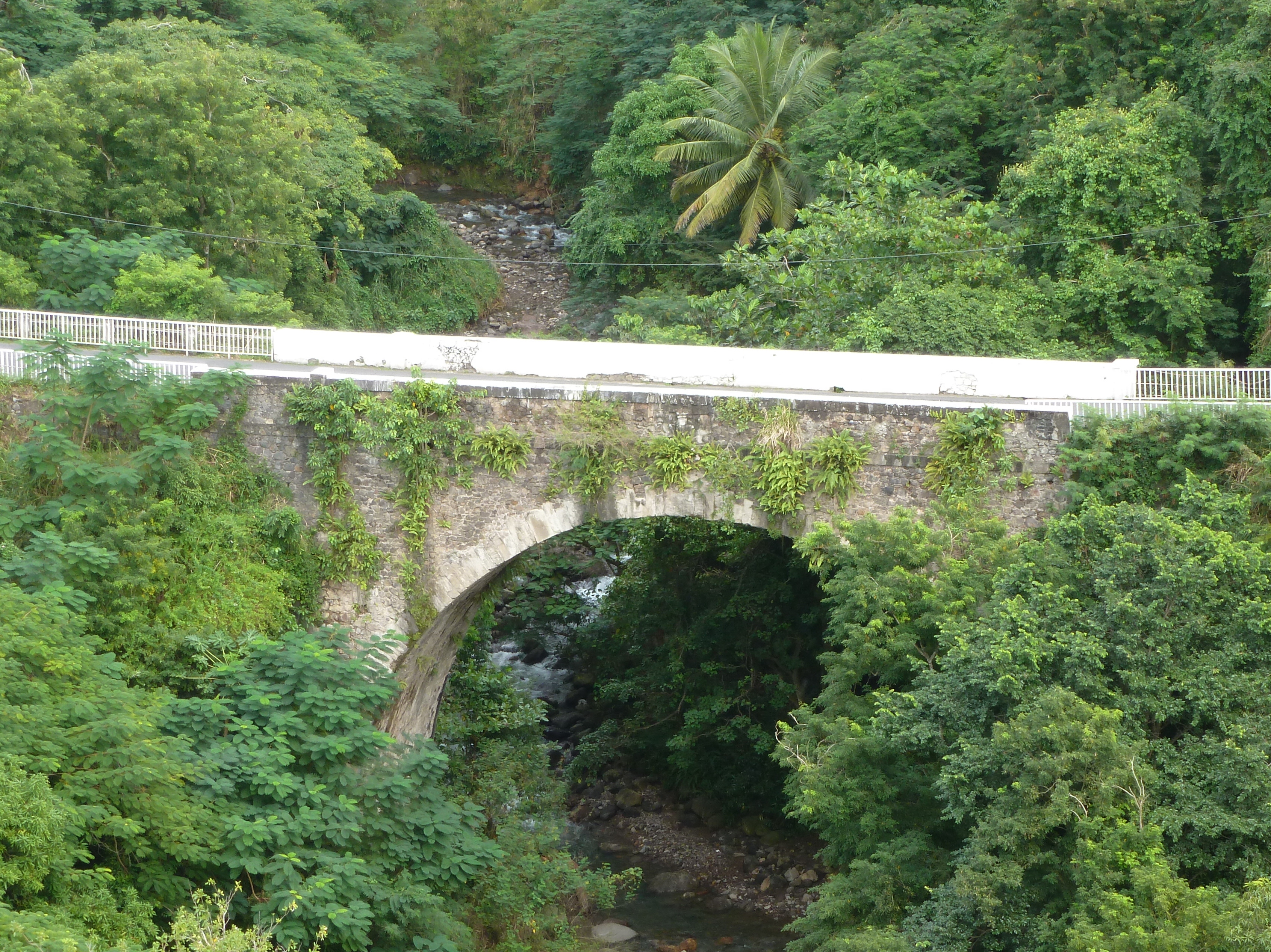 Vue du pont sur le Galion